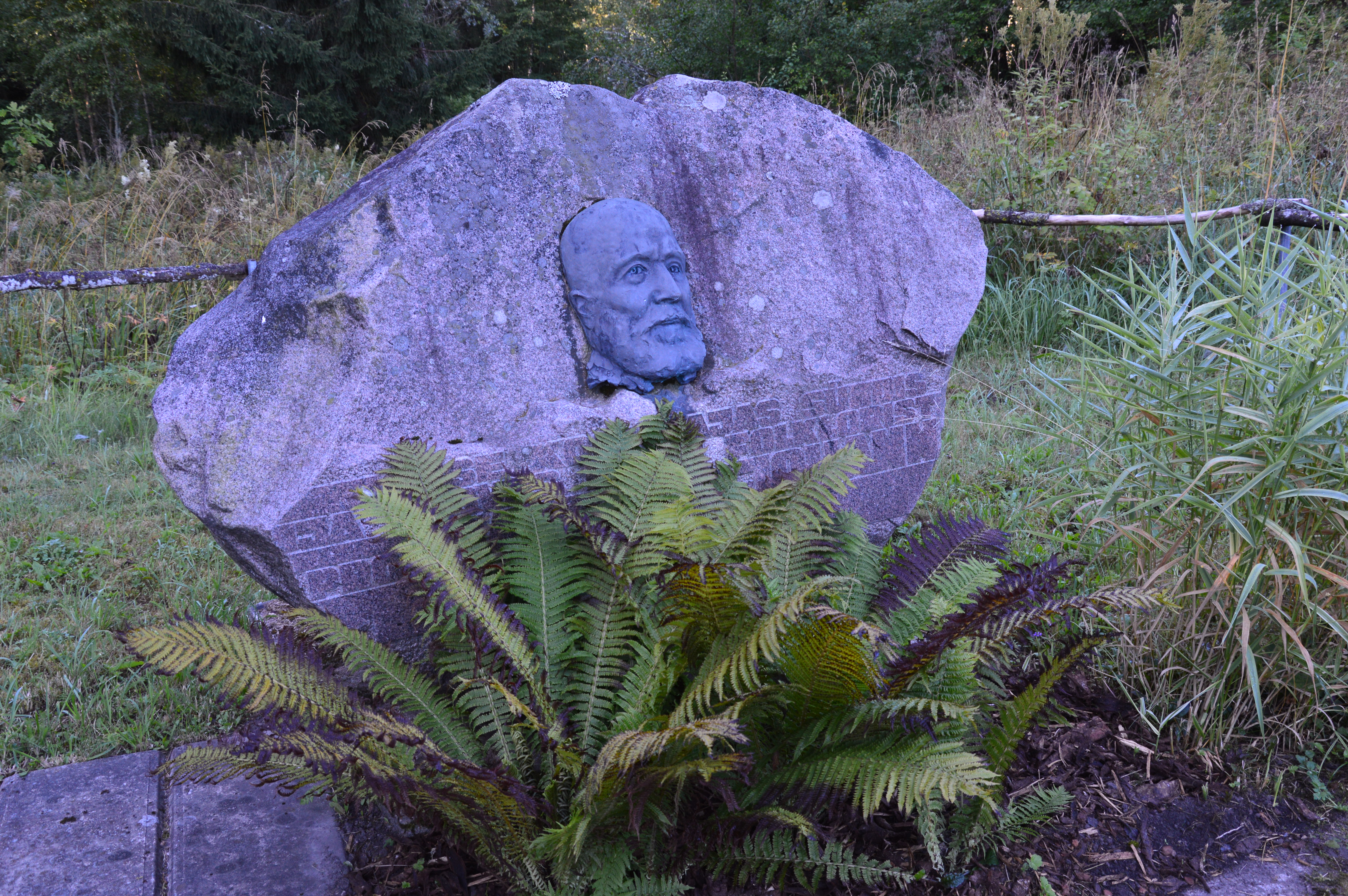 Matthias Johann Eiseni mälestuskivi